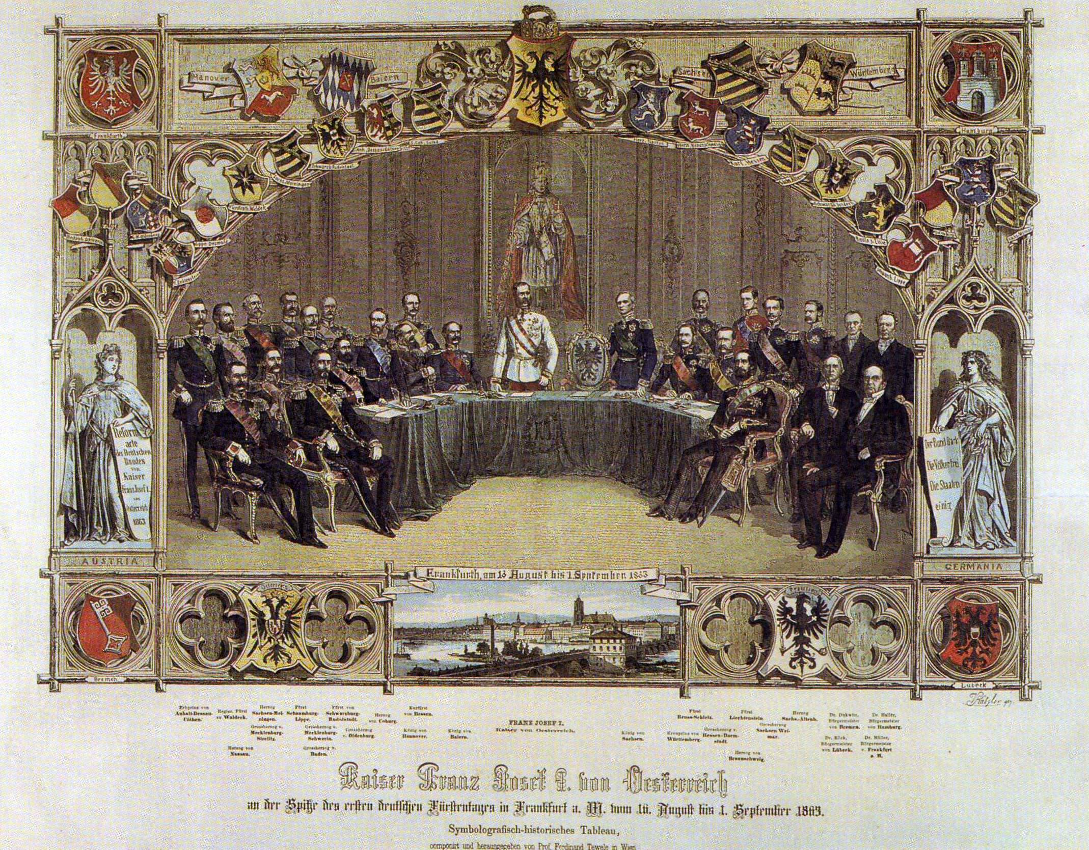 Frankfurter Fürstentag, 1863